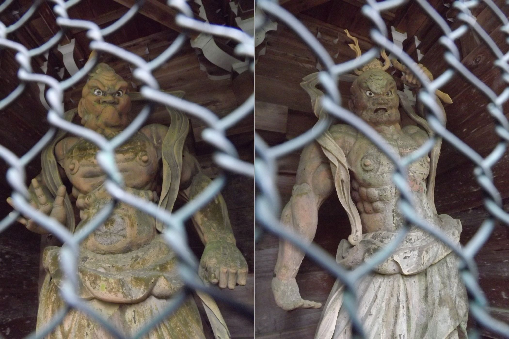 大宝寺の仁王像